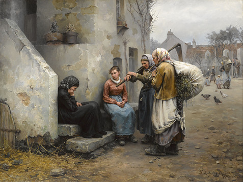 Un Deuil